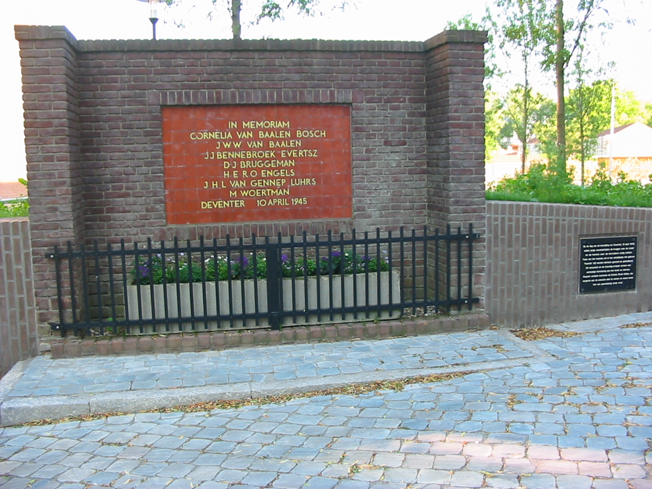 Twentolmonument Deventer, vanwege het "Twentol-drama".